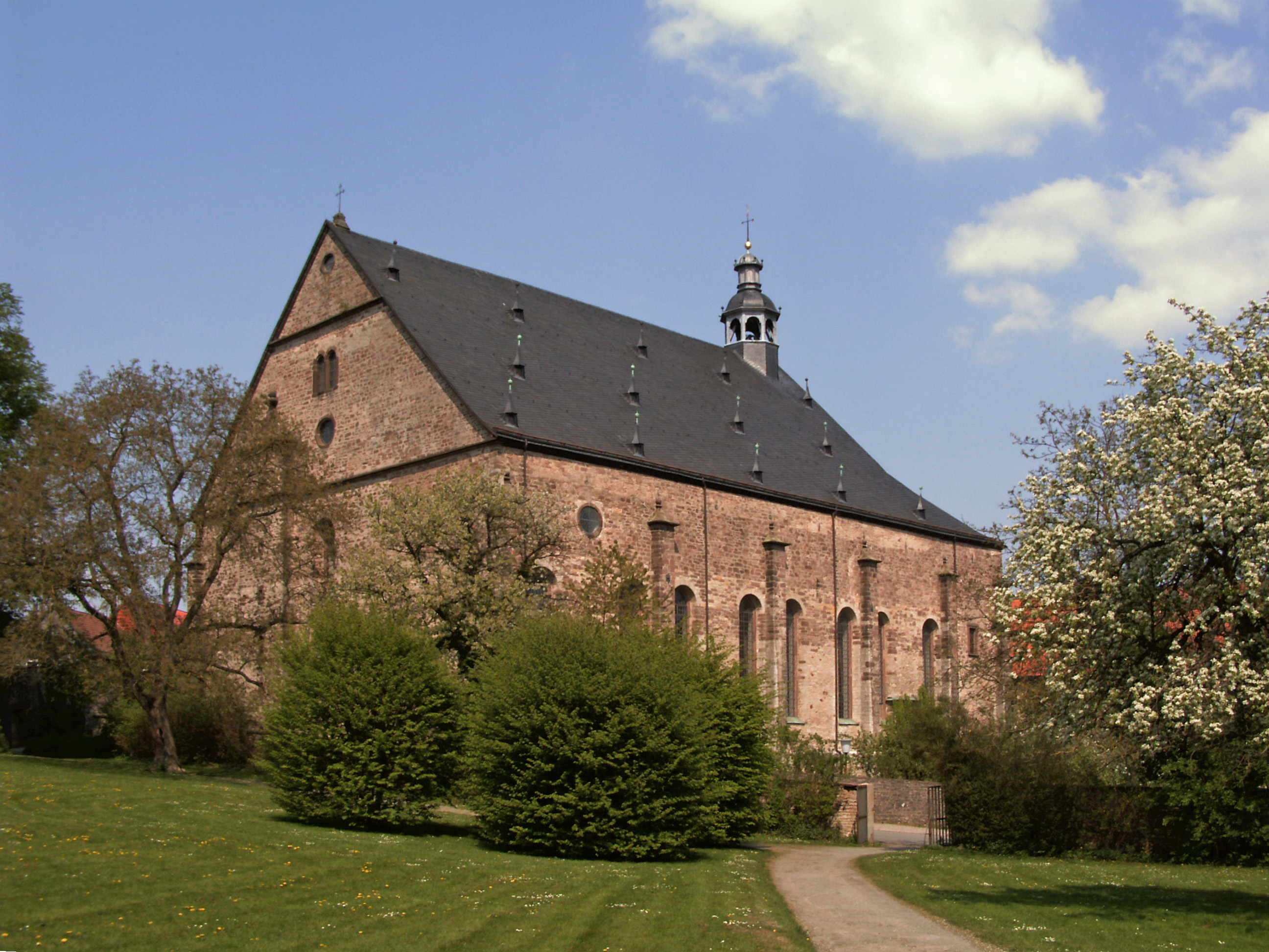 Katholische Kirche St. Hadrian und Dionysius in Lamspringe